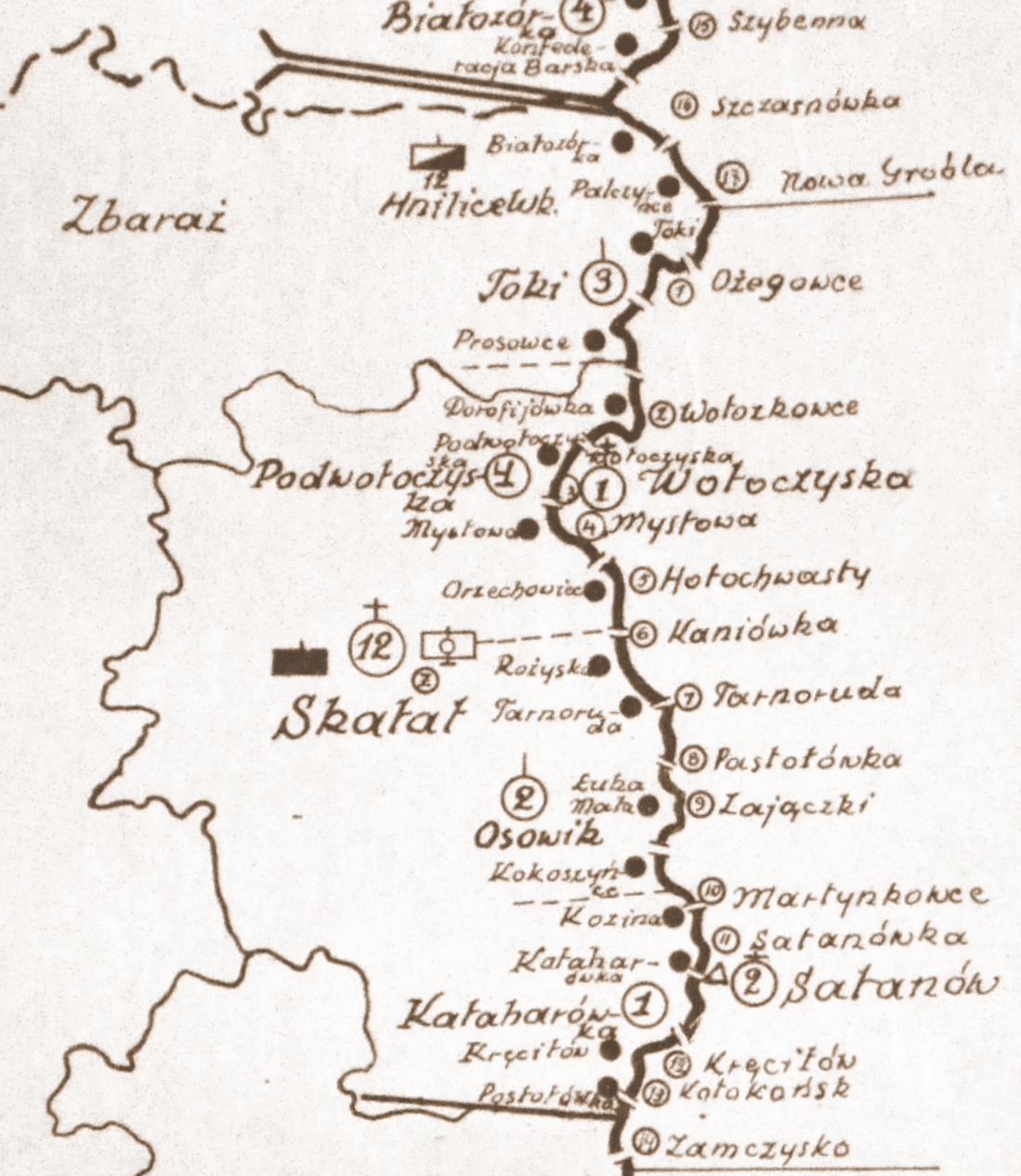 Szkic rozmieszczenia batalionu KOP Skałat w 1931